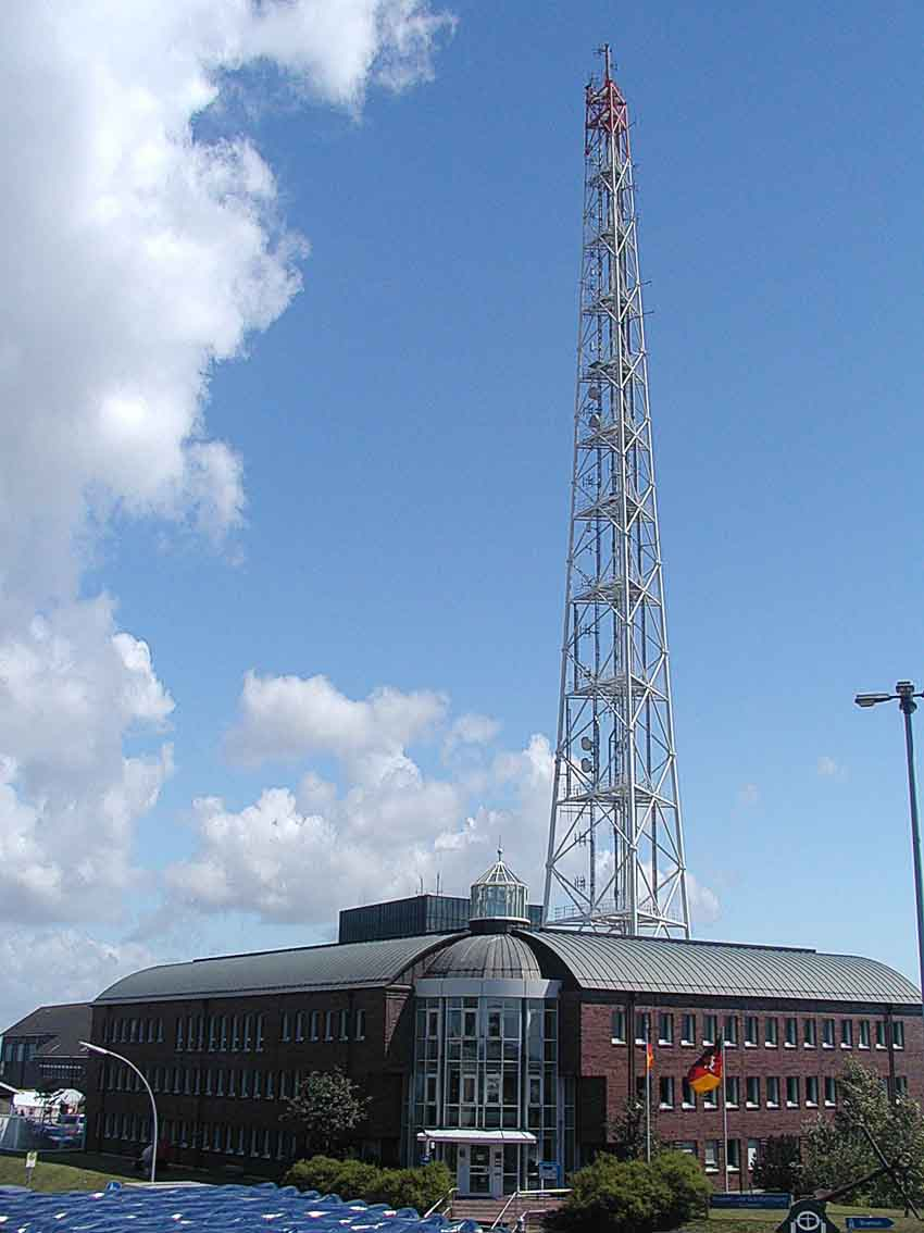 Wasser- und Schifffahrtsamt Cuxhaven